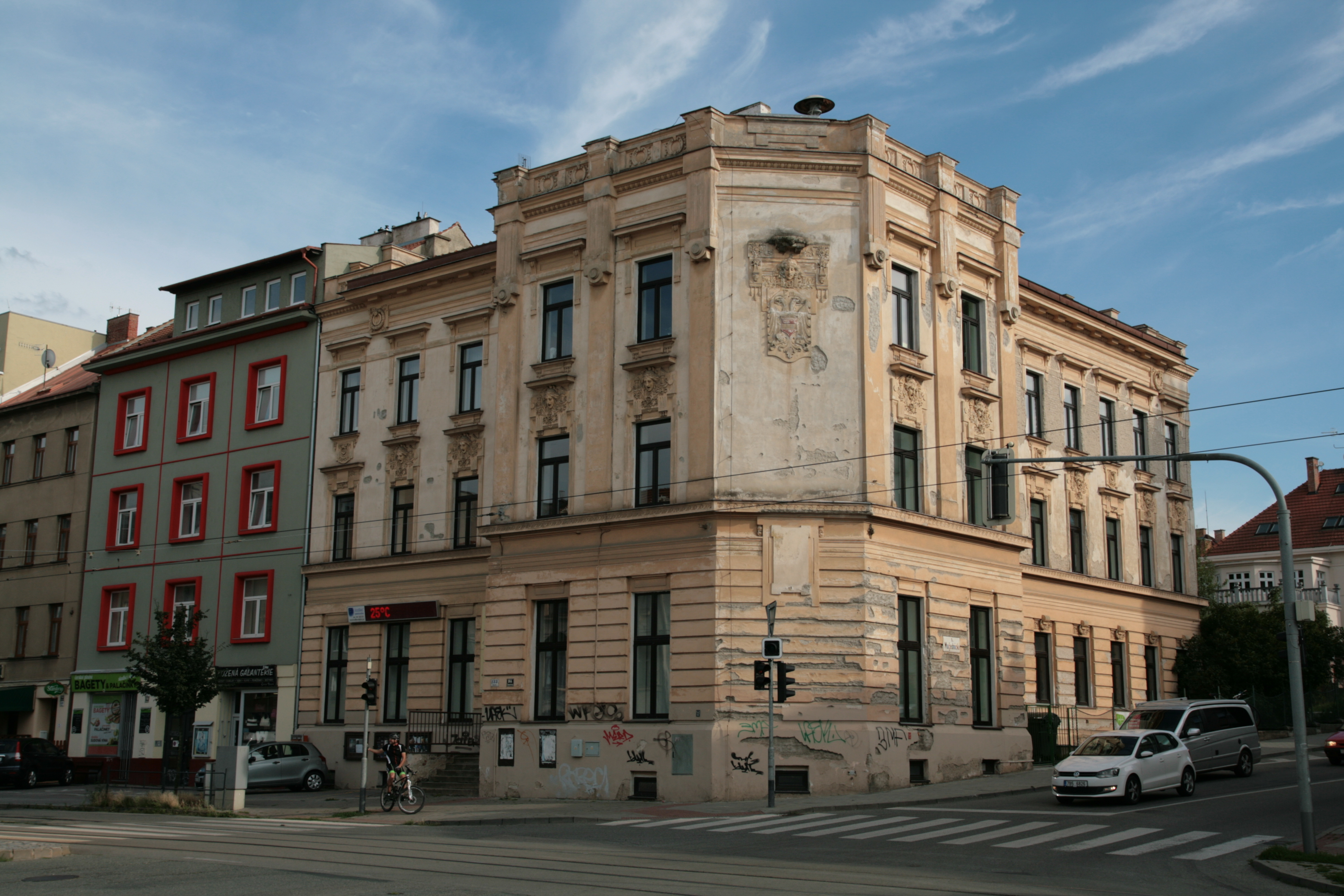 Základní umělecká škola a Divadelní studio V, Veveří 944/133, Brno-Žabovřesky.